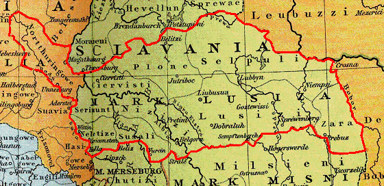 Heiliges Römisches Reich um 1000, Ausschnitt Sächsische Ostmark